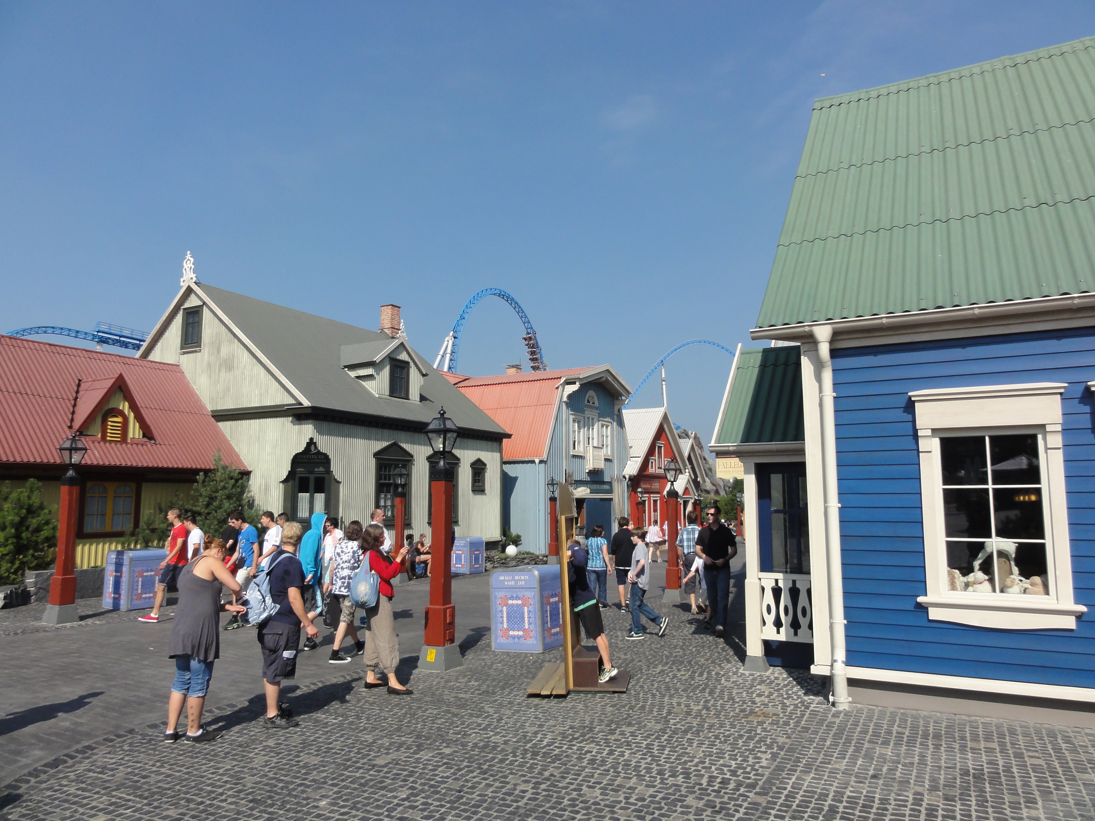 Quartier islandais, Europa-Park, Rust, Bade-Wurtemberg, Allemagne.